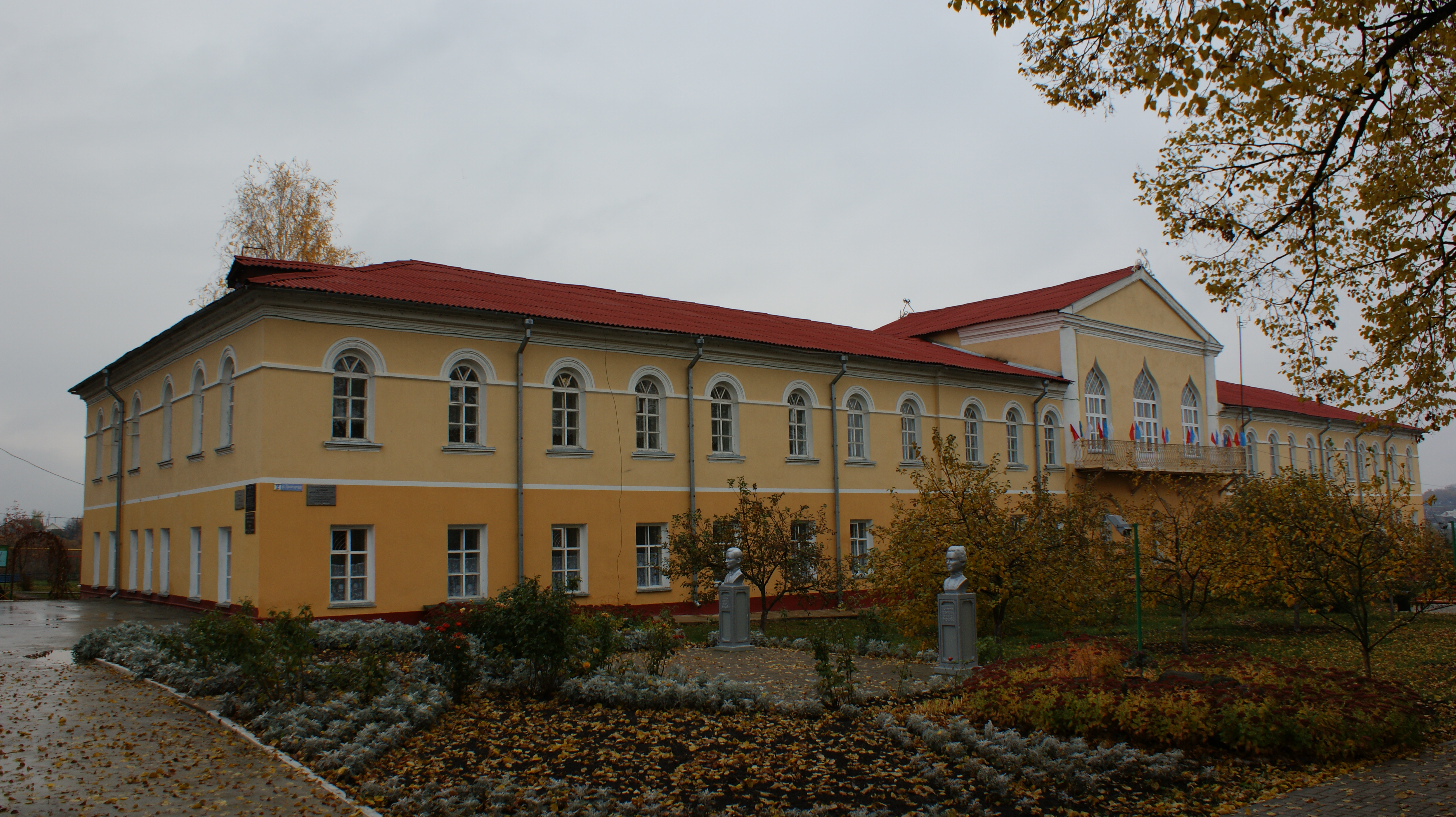 Главный дом (Белгородская область, Грайворон, р. п. ракитное)